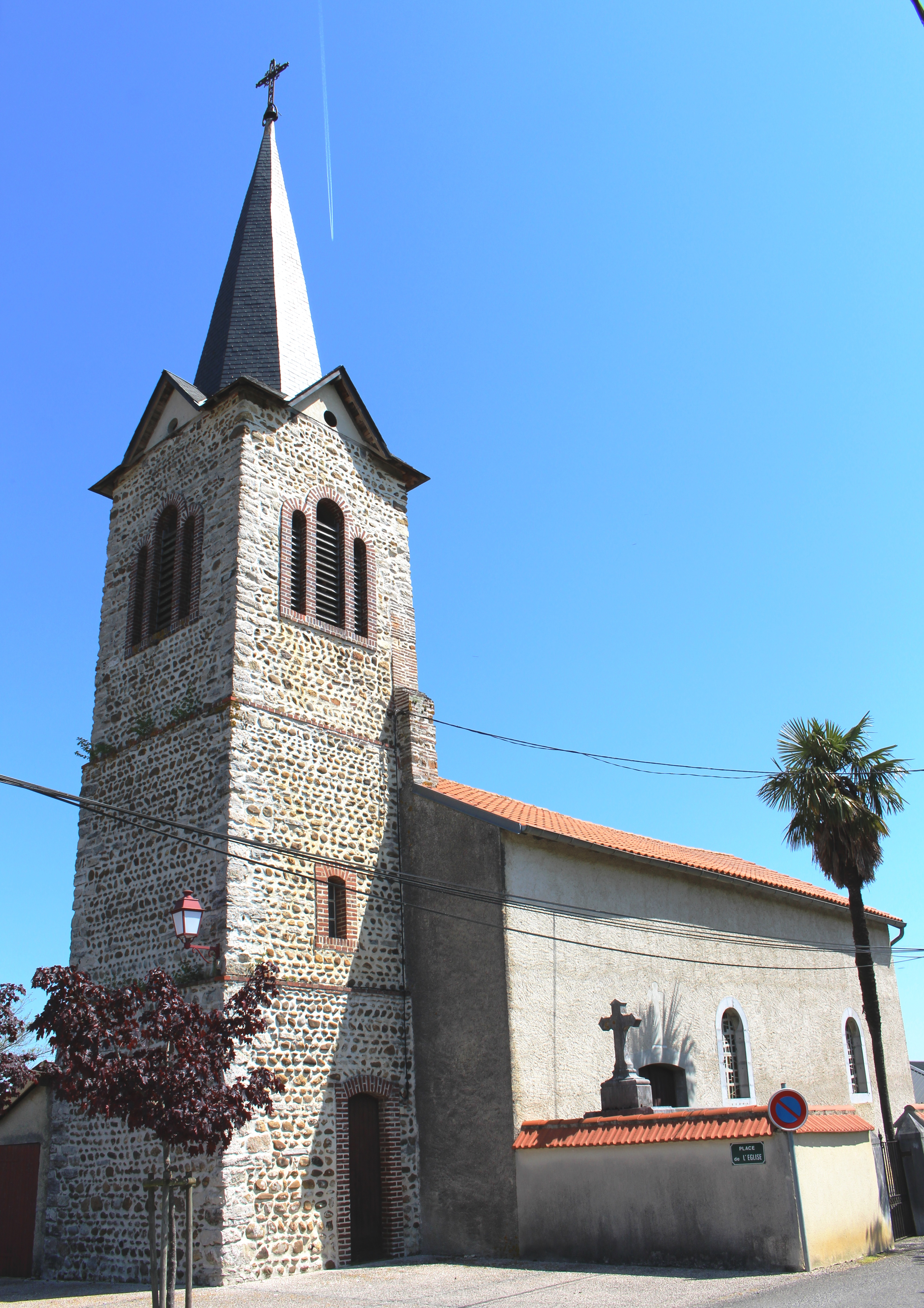 Église Saint-Jean-l'Evangéliste de Hourc (Hautes-Pyrénées)